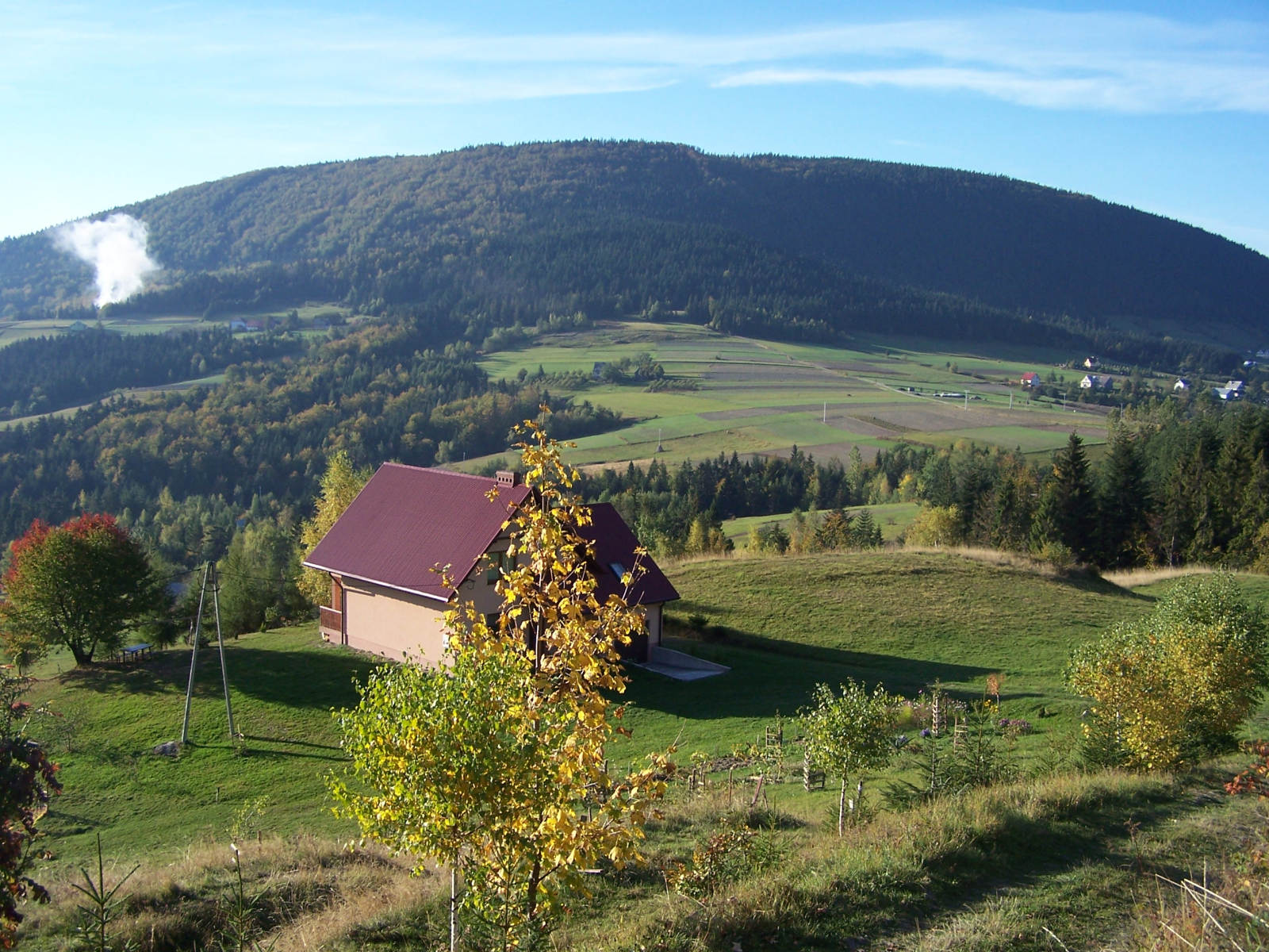 Modyń (Beskid Wyspowy)